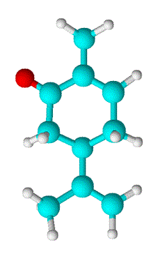 karvon ball&stick